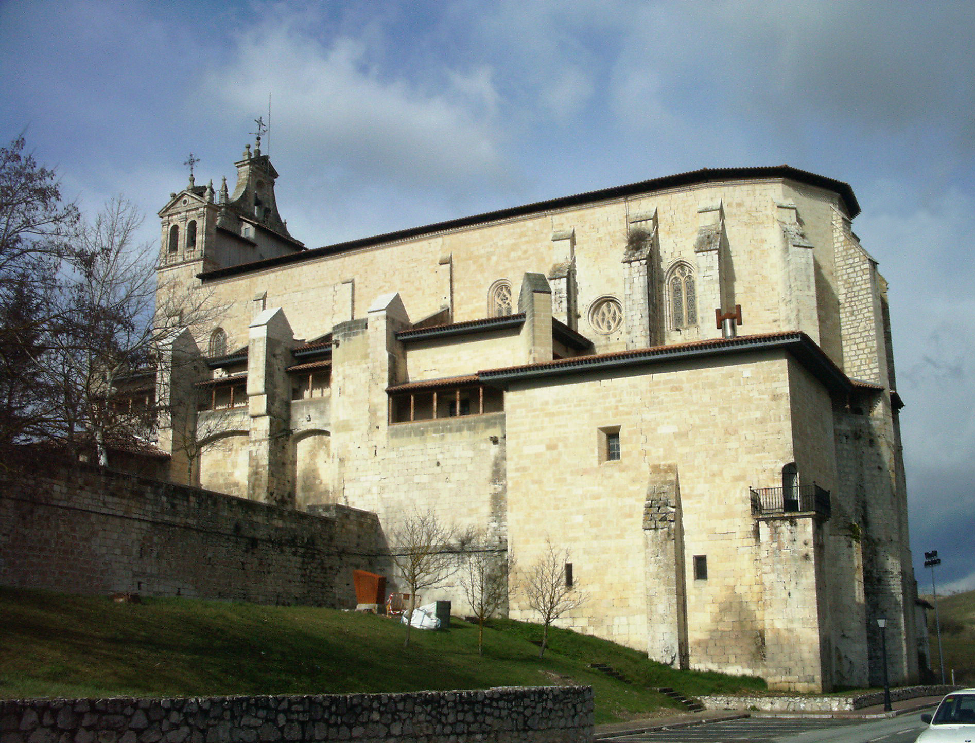 Aguraingo Andra Mari eliza.